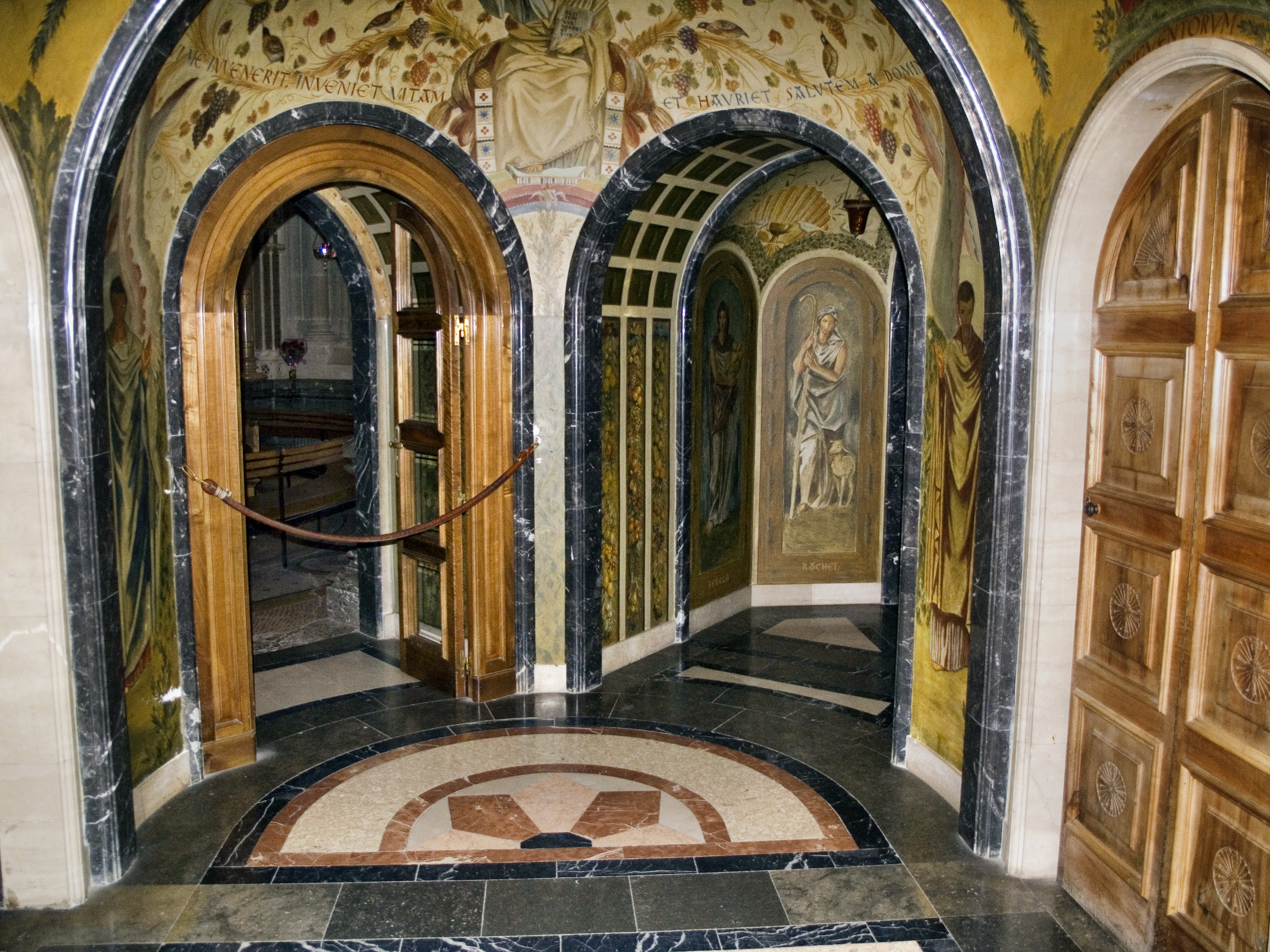 Каталония, монастырь Монсеррат - капелла в заалтарной часовне